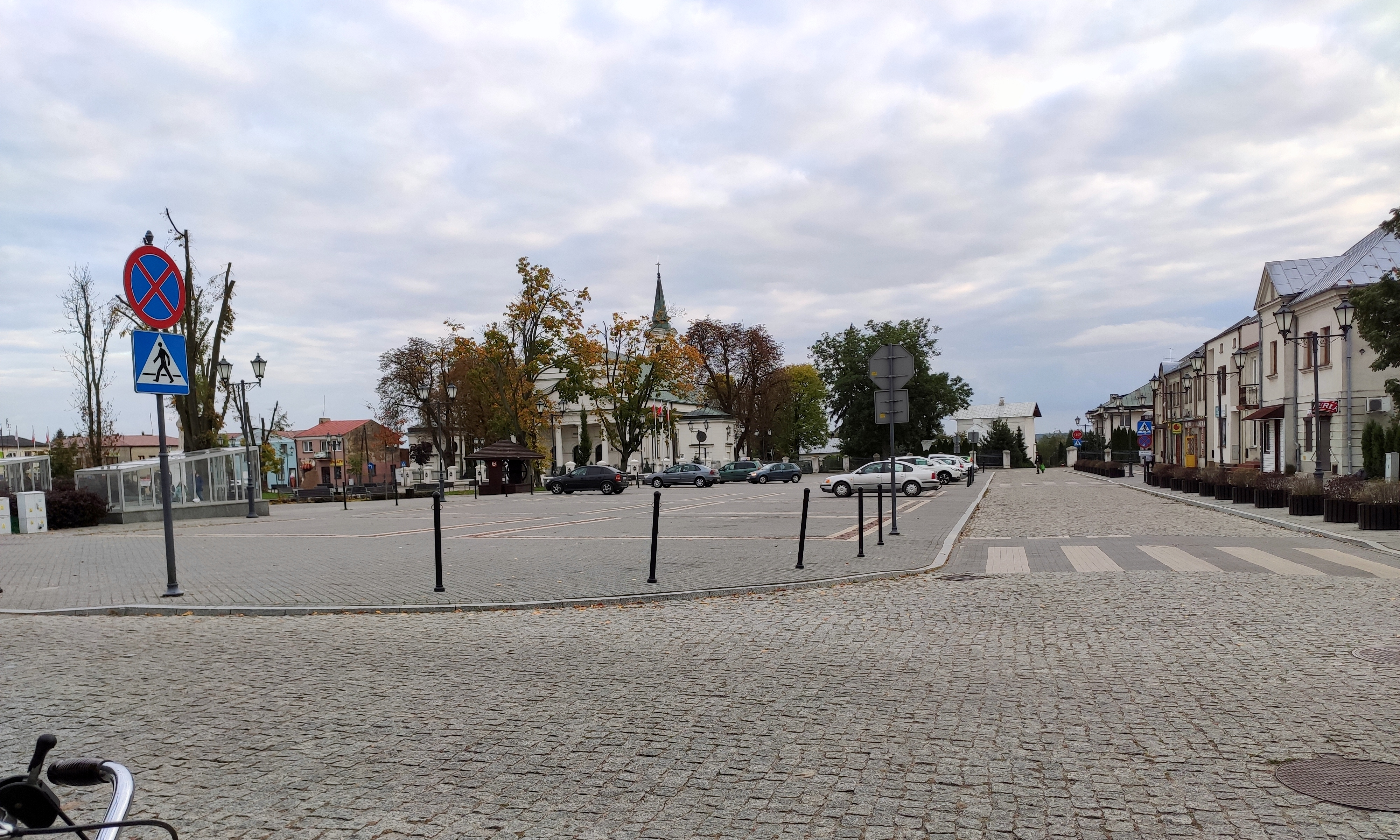 Rynek w Kocku po rewitalizacji w 2013r.